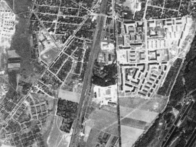 Fort IXa Twierdzy Poznań sfotografowany przez satelitę KH-4A 1023, 23 sierpnia 1965 r.